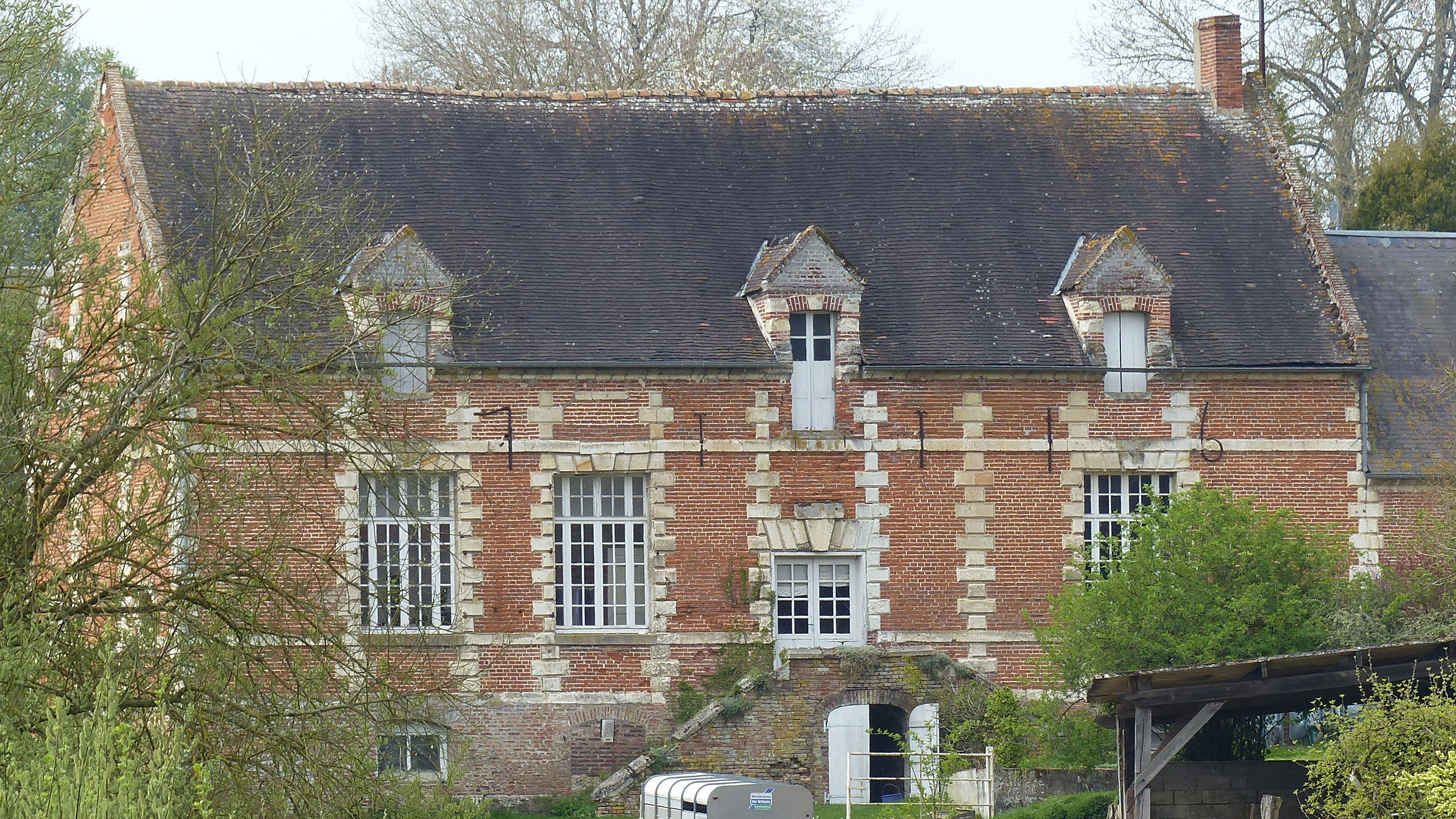 Ferme à Méréaucourt